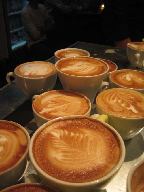 Latte Art Jam.